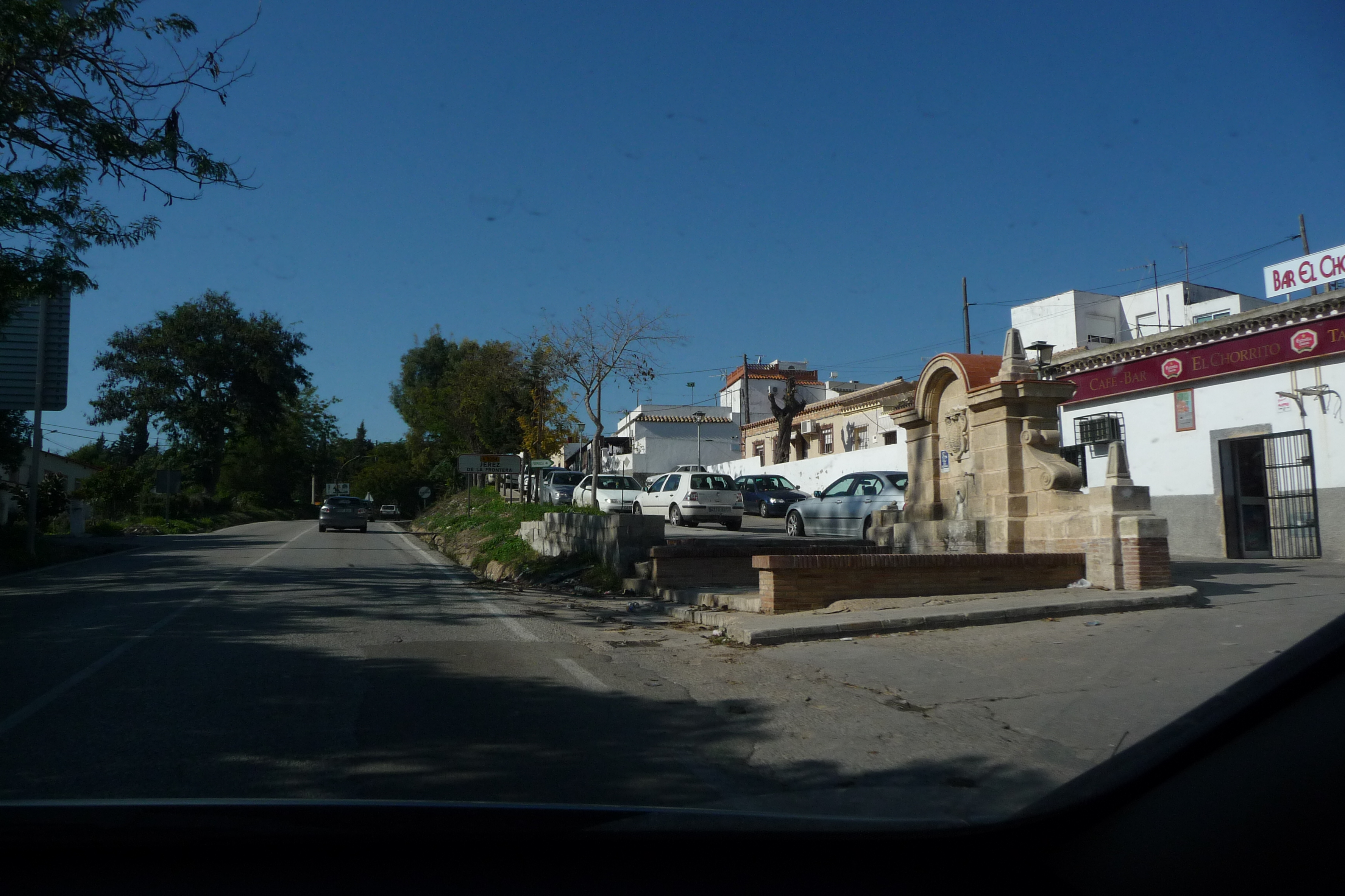 Los Albarizones, Jerez de la Frontera. (Andalusia, Spain).